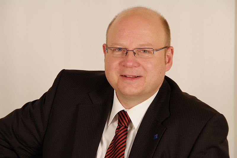 Frank Mindermann, Landtagsabgeordneter Niedersachsen, 16. Wahlperiode (Fotoprojekt Landtagsabgeordnete Niedersachsen am 24. und 25. November 2009)